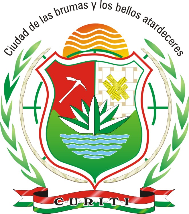 Escudo del municipio de Curitì, Santander, colombia